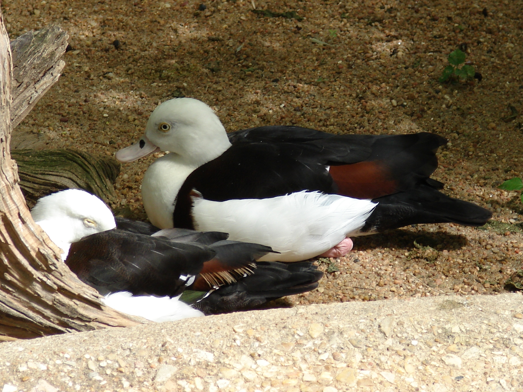 Taken at San Antonio Zoo, Tadorna radjah radjah